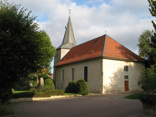 St.-Georgskirche, Warberg